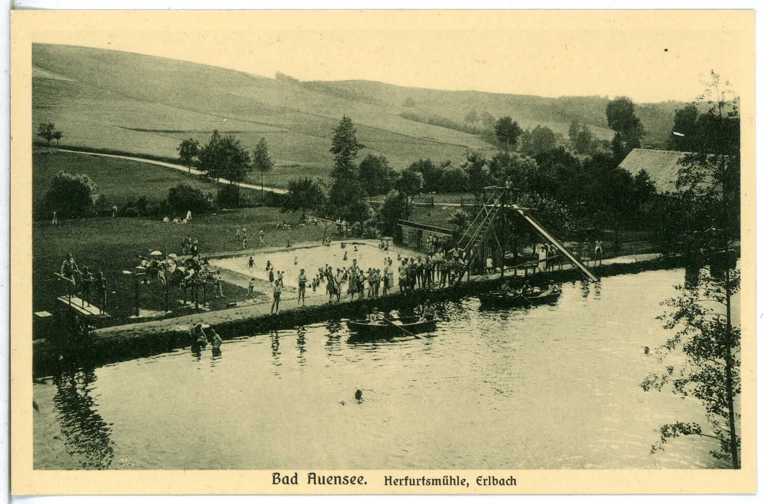 Bad Auensee; Herfurtsmühle, Erlbach This postcard is from publisher Brück & Sohn in Meißen ( postcard has a unique number 23699 and is available in a higher resolution at the publisher. This images was uploaded in a cooperation project between Wikipedians and the publisher.